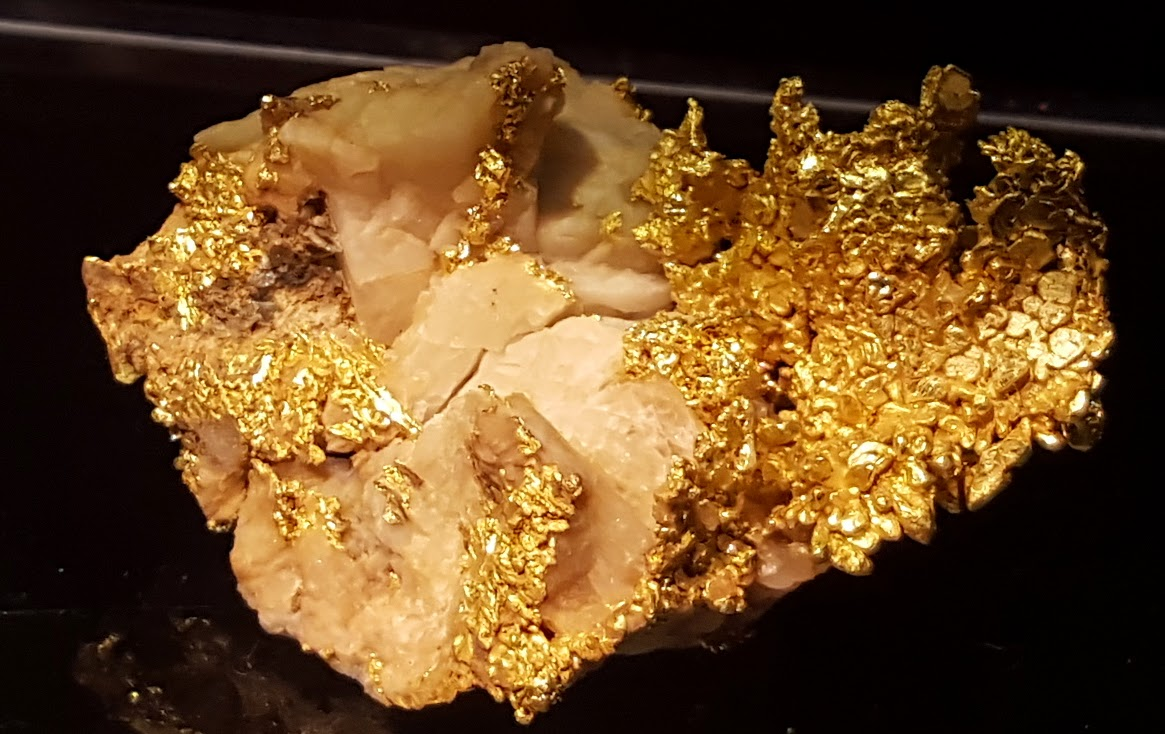 Gull i kvarts.